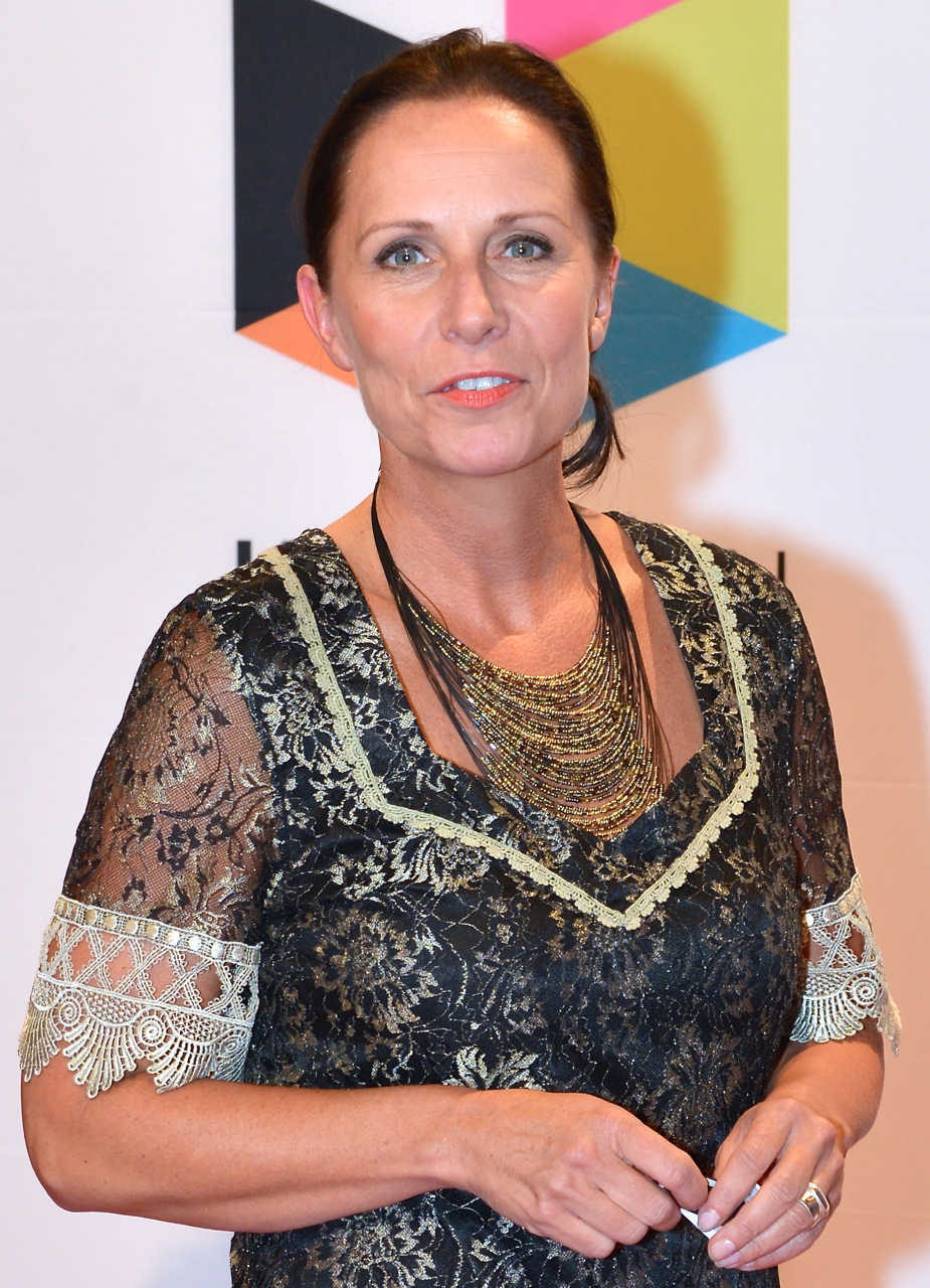 Karin Mattisson på Kristallen-galan den 30 augusti 2013.